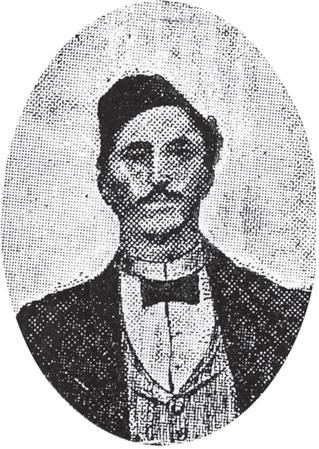 Методий (Тодор) Кусев.